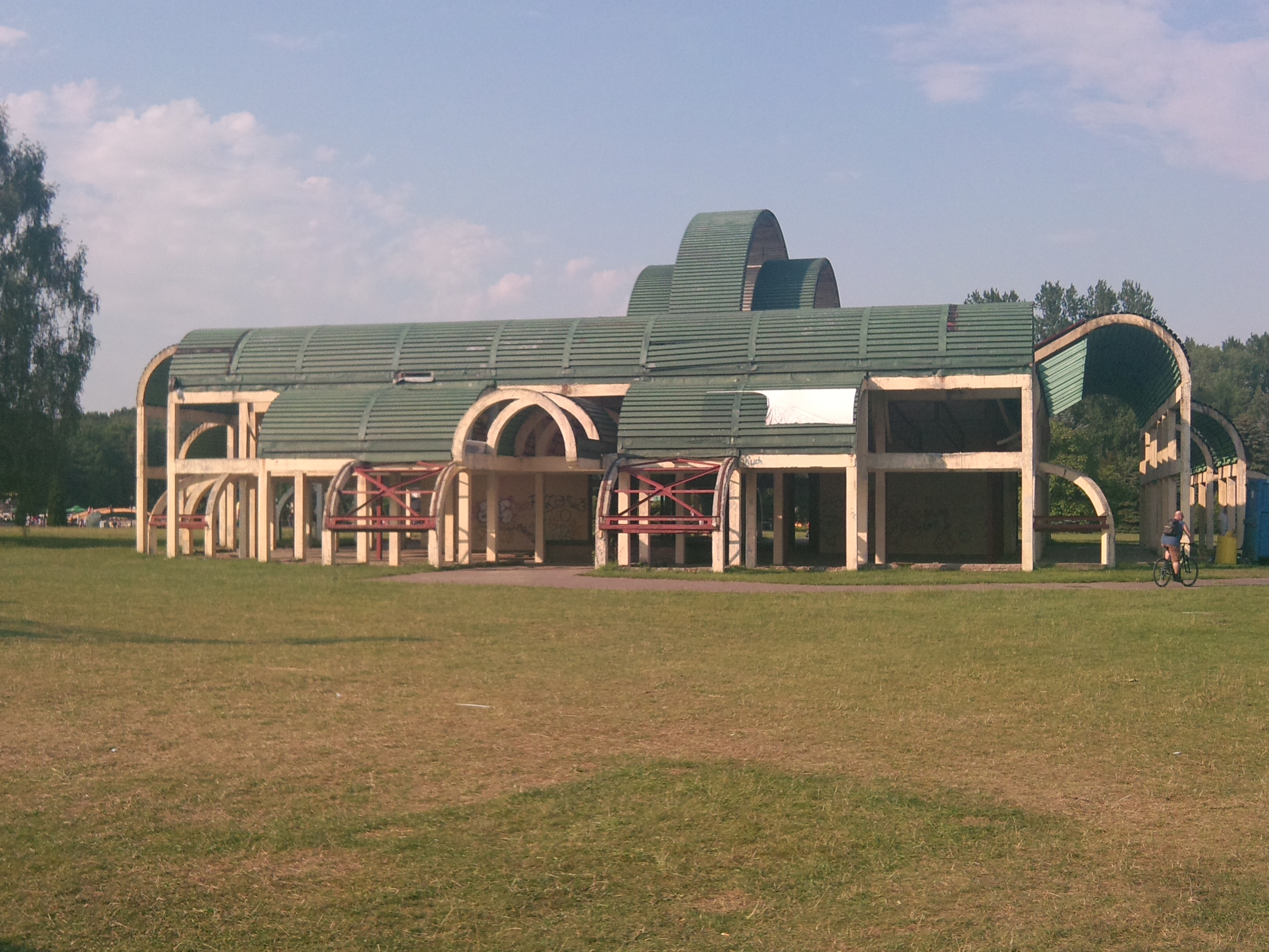 Silesian Central Park